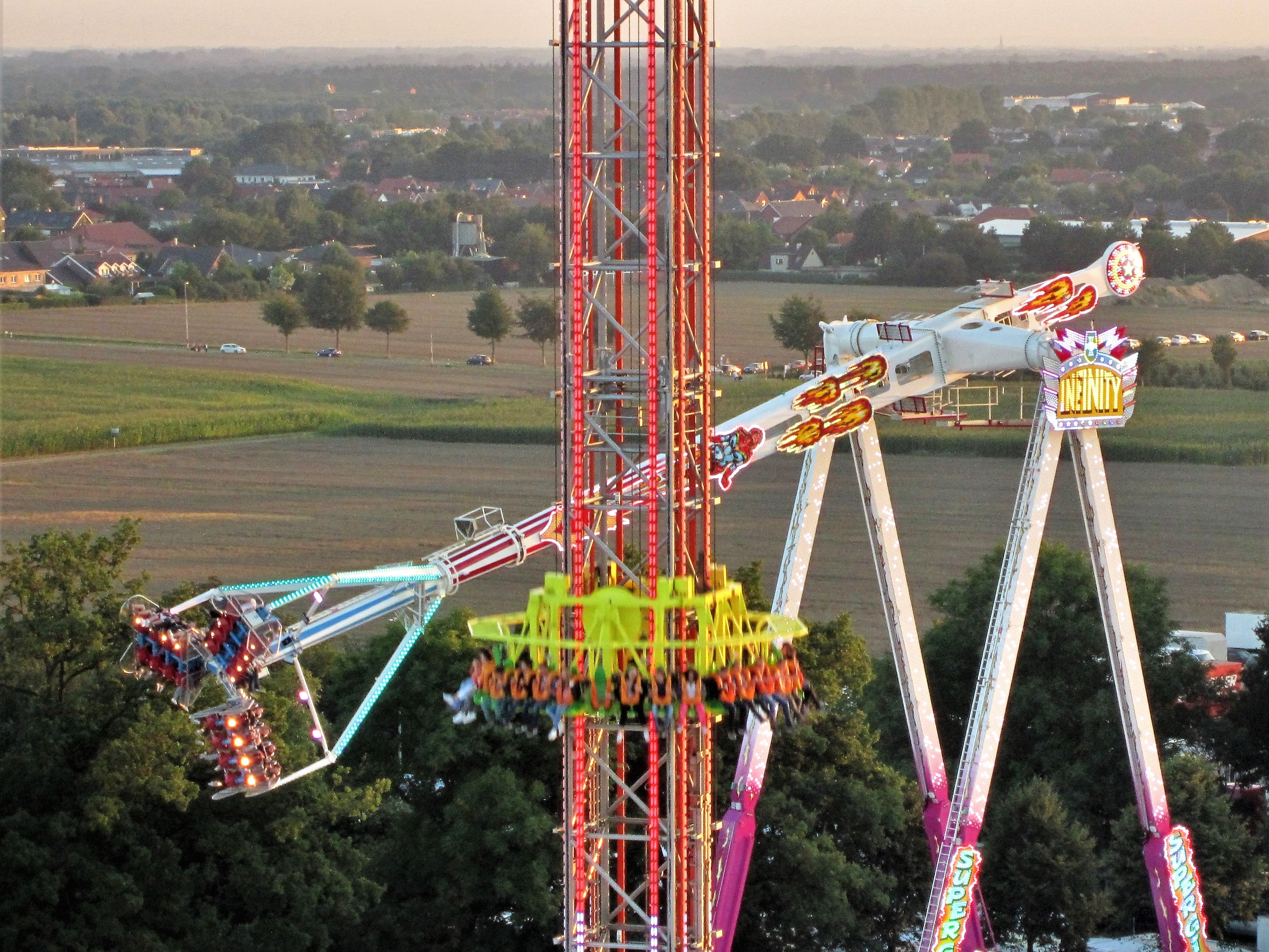 Vechta: Stoppelmarktszene, aus dem Riesenrad heraus aufgenommen